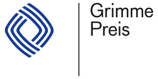 Logo des Grimme-Preises 2011